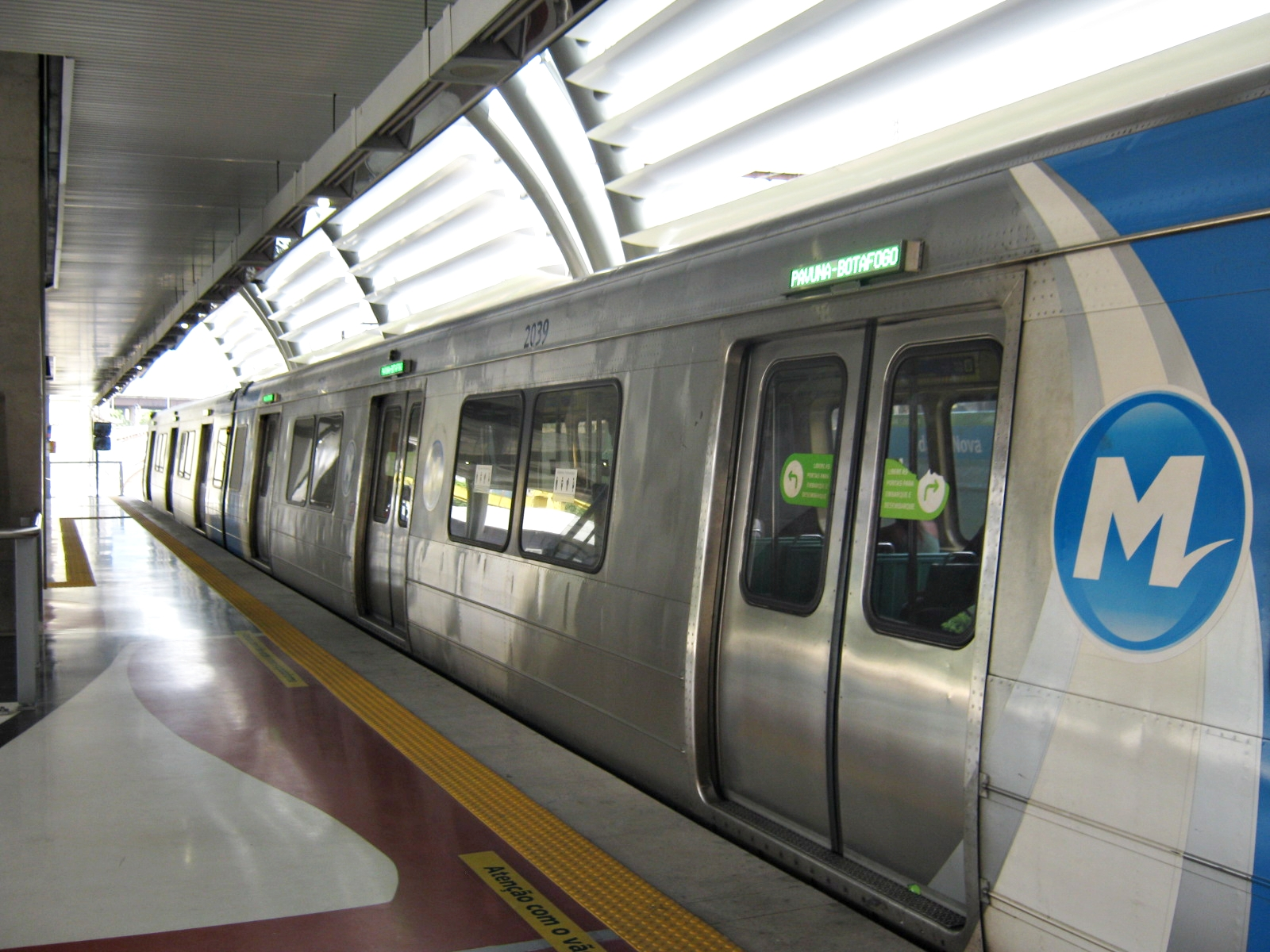 Estação de metrô Cidade Nova - Rio de Janeiro, Brasil.